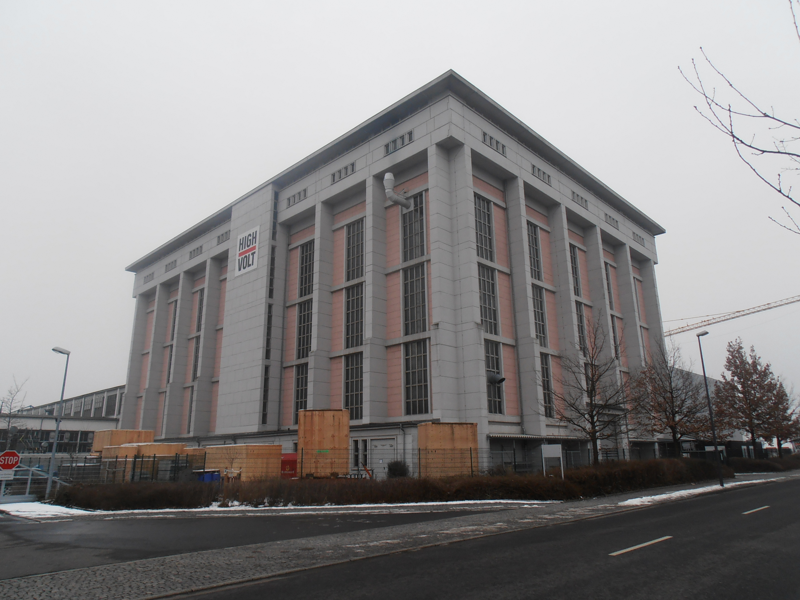 VEB Transformatoren- und Röntgenwerk, Overbeckstr. 48 Blick von Nord-Westen